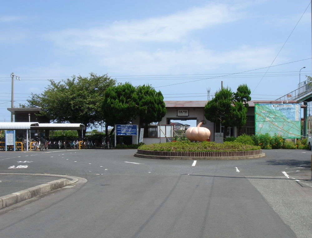 日豊本線三毛門駅駅舎全景。2006年8月28日に投稿者↑ＰＯＮが撮影。2006年9月11日に一部編集の上でアップロード